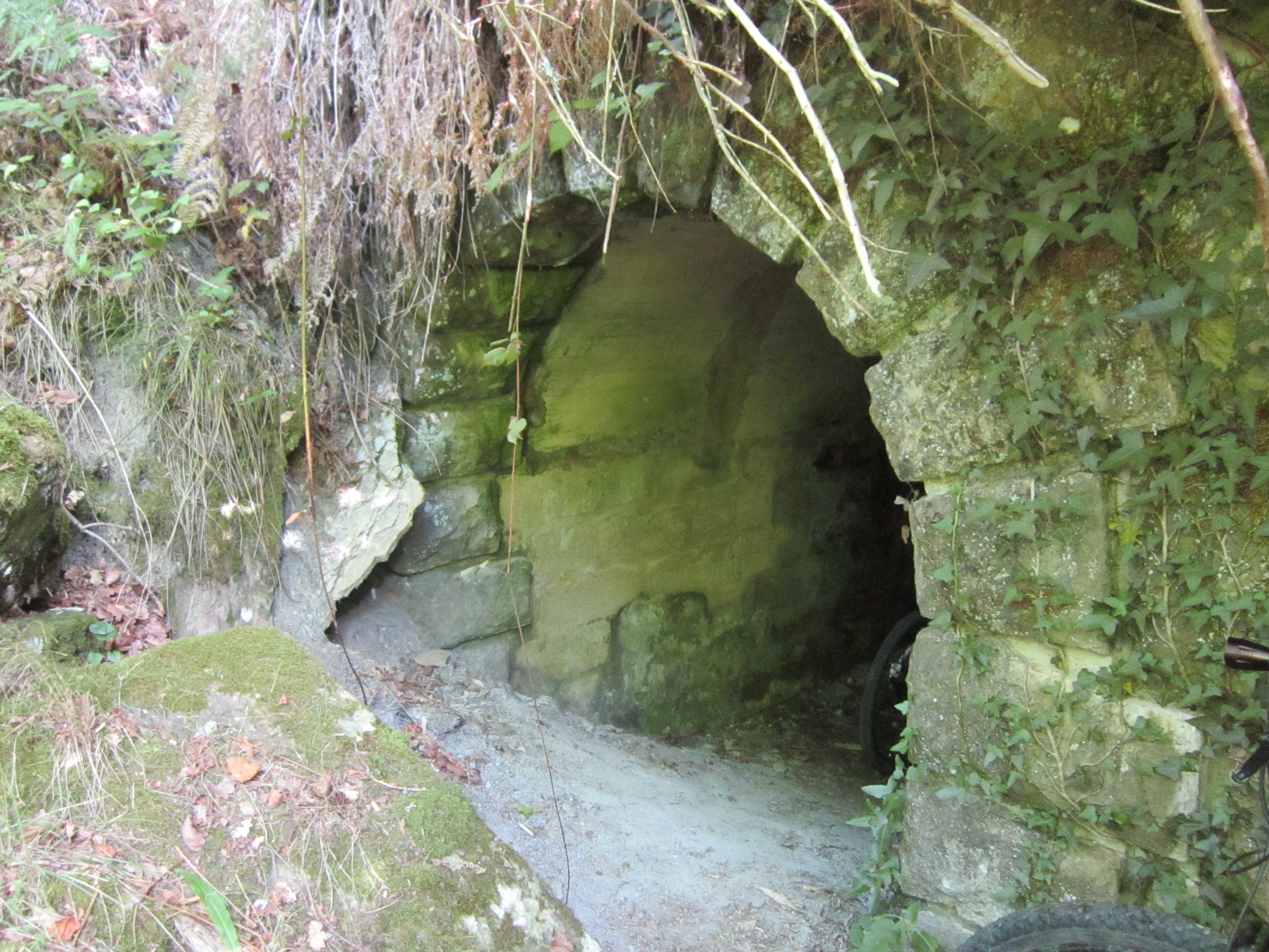 Galería lateral auxiliar de entrada en la parte burgalesa.